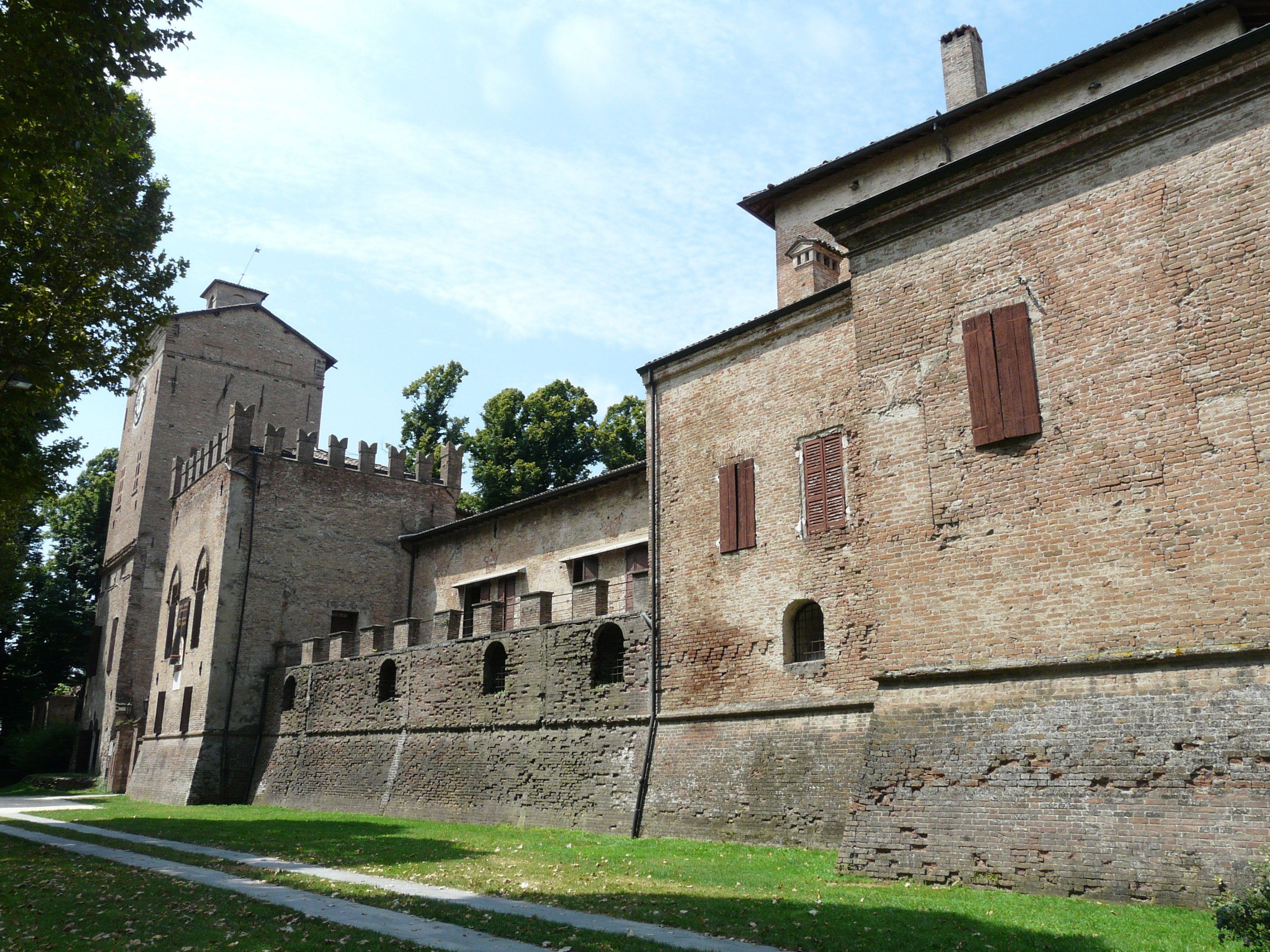 Rocca dei Rossi, San Secondo Parmense, Emilia-Romagna, Italia